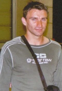 Photo du joueur de football Patrice Carteron lors de la saison 2004-2005. Cette photo à été prise par Mickaël Roure alias Altrensa pour Wikipédia. Elle ne saurait être utilisée sans la mention de son auteur. D'avance merci.